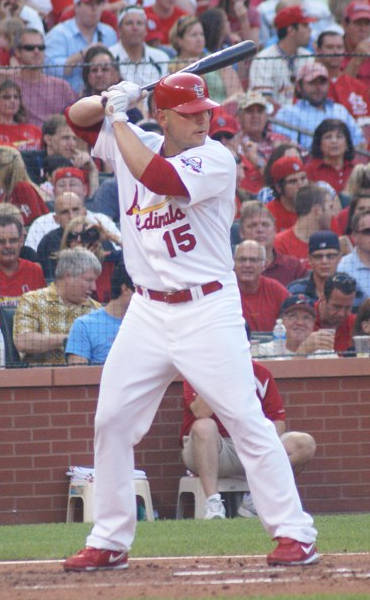 Matt Holliday